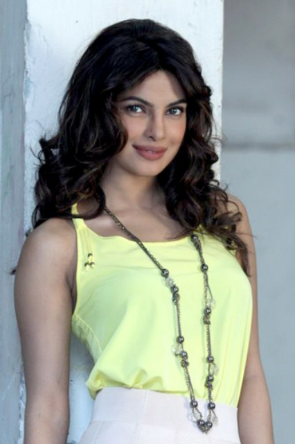 en|1=Priyanka promotes 'Teri Meri Kahaani'}